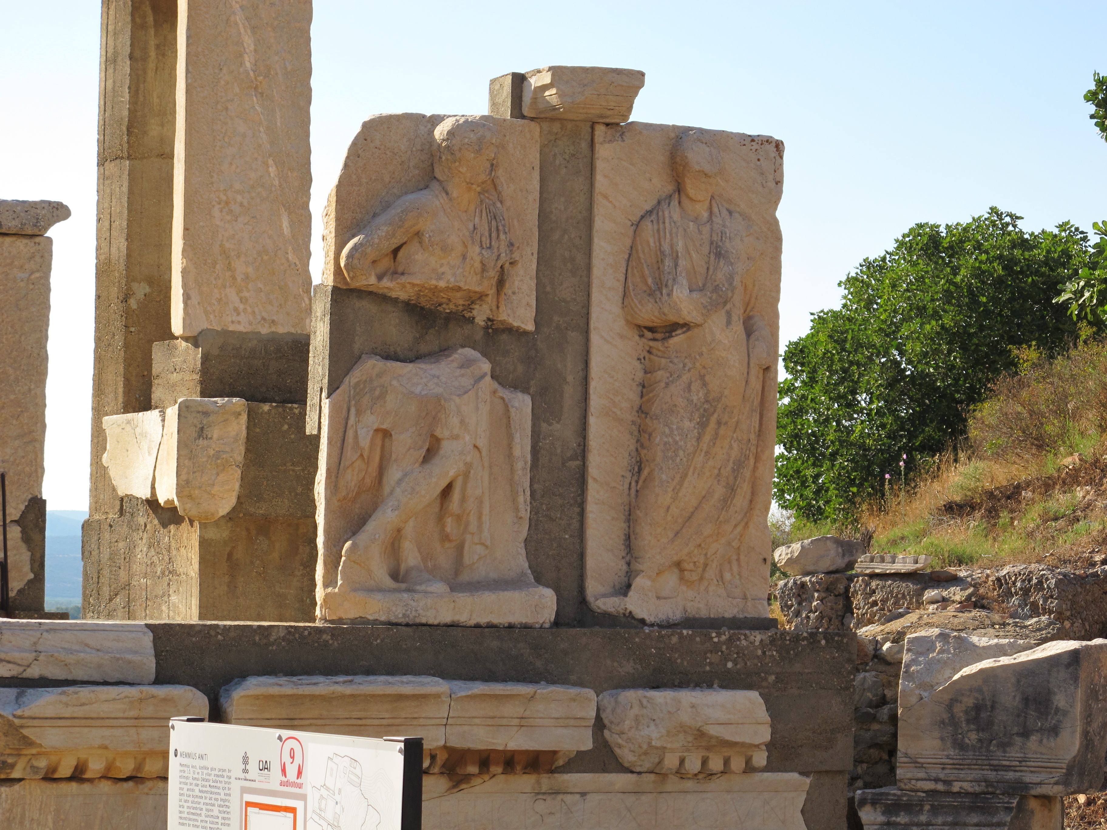 Efeso, hydreion